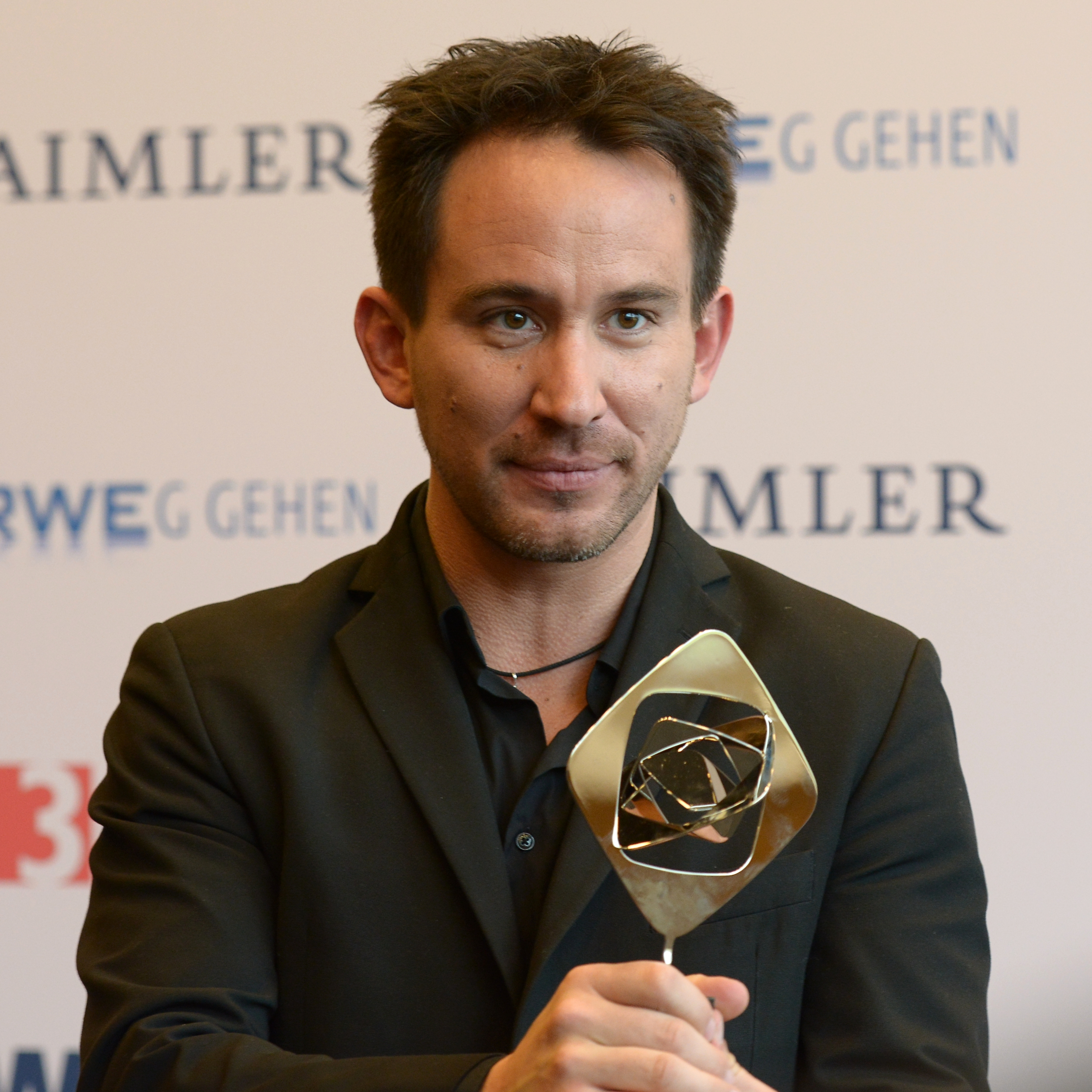 Marcel Mettelsiefen bei der Verleihung des Grimme-Preises 2015.